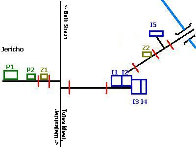 Schematische Darstellung der Allenby-Brücke auf der israelischen Seite